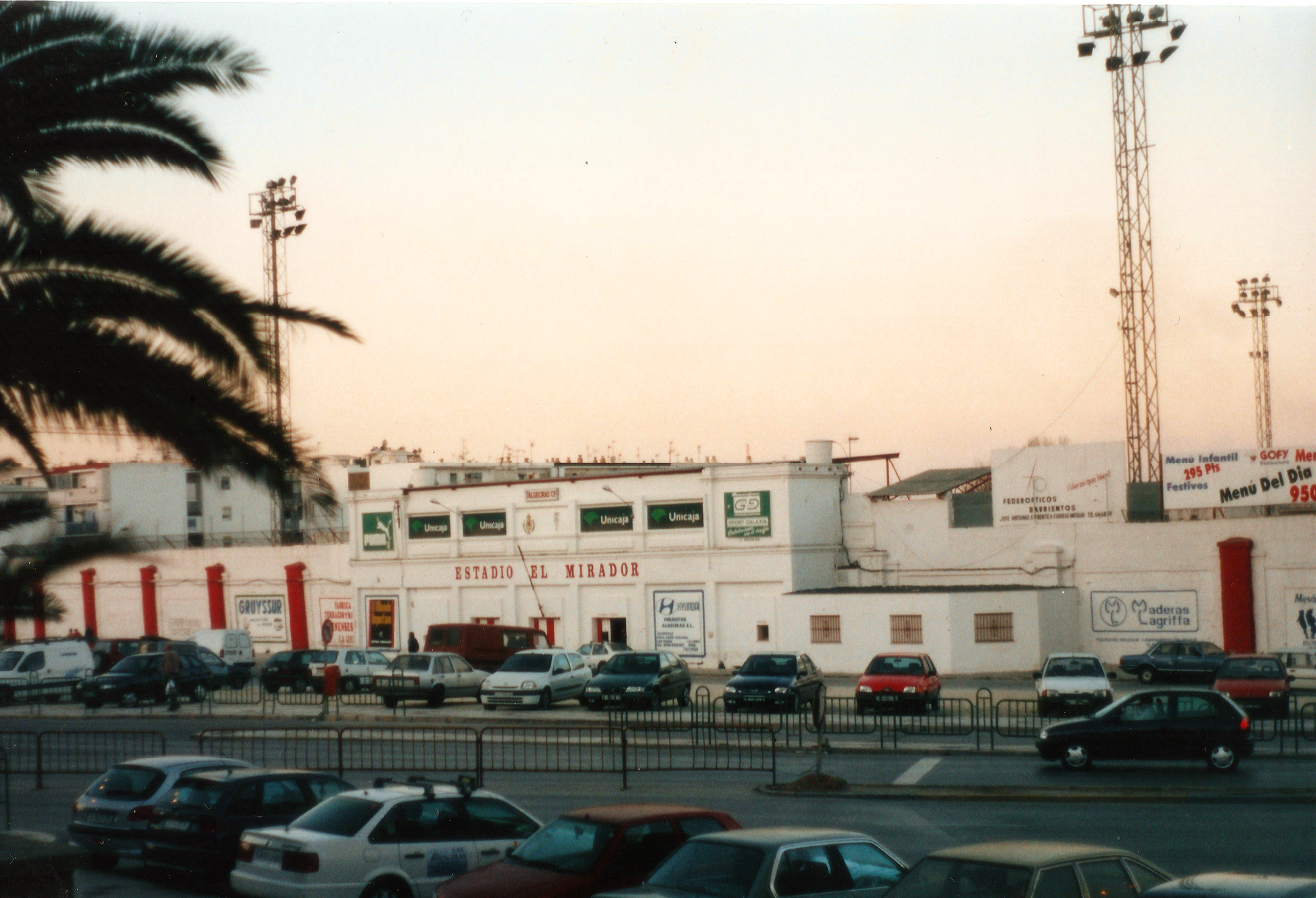 Estadio de El Mirador en los días previos a su demolición en 1999. Vista de la entrada principal. Este estadio de fútbol fue construido en 1954 en los terrenos próximos a la playa de Los Ladrillos de Algeciras, Andalucía, España.